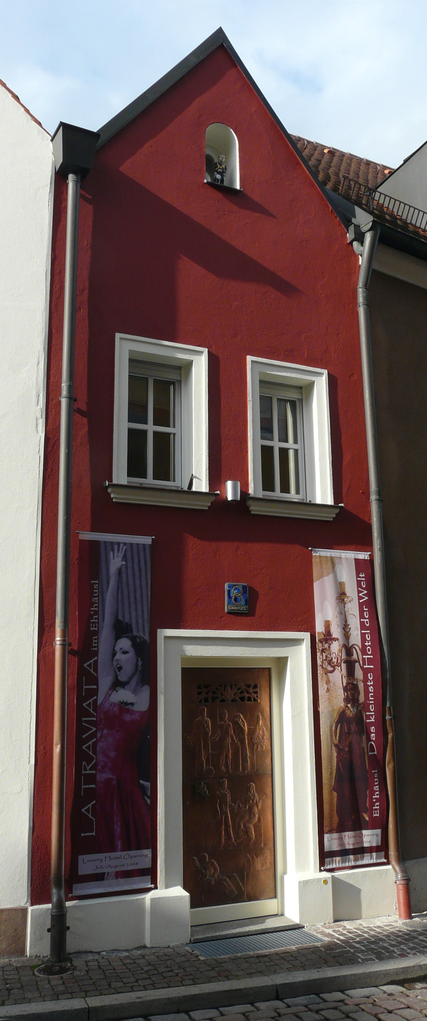 Das Hotel Eh’häusl in Amberg